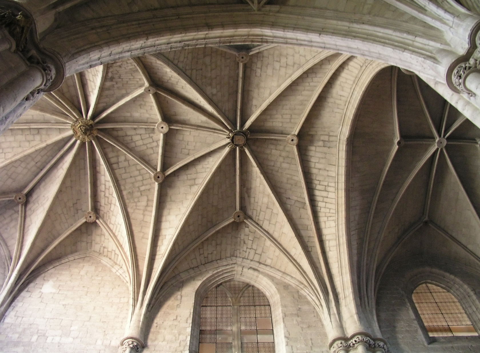 Detalle de la bóveda de la iglesia del convento de San Benito (Valladolid)